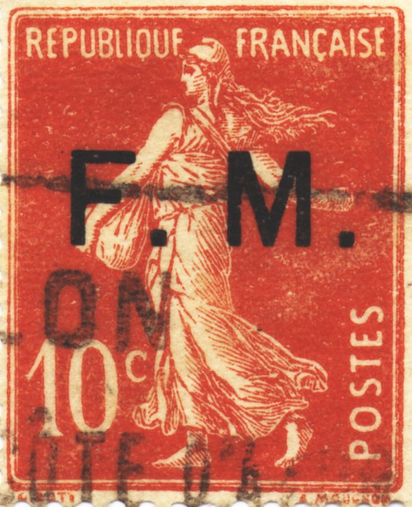 Type Semeuse camée surchargé FM (Franchise militaire).